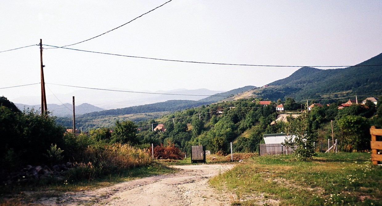 Vágáshuta, Nagypart, 3992 Hungary